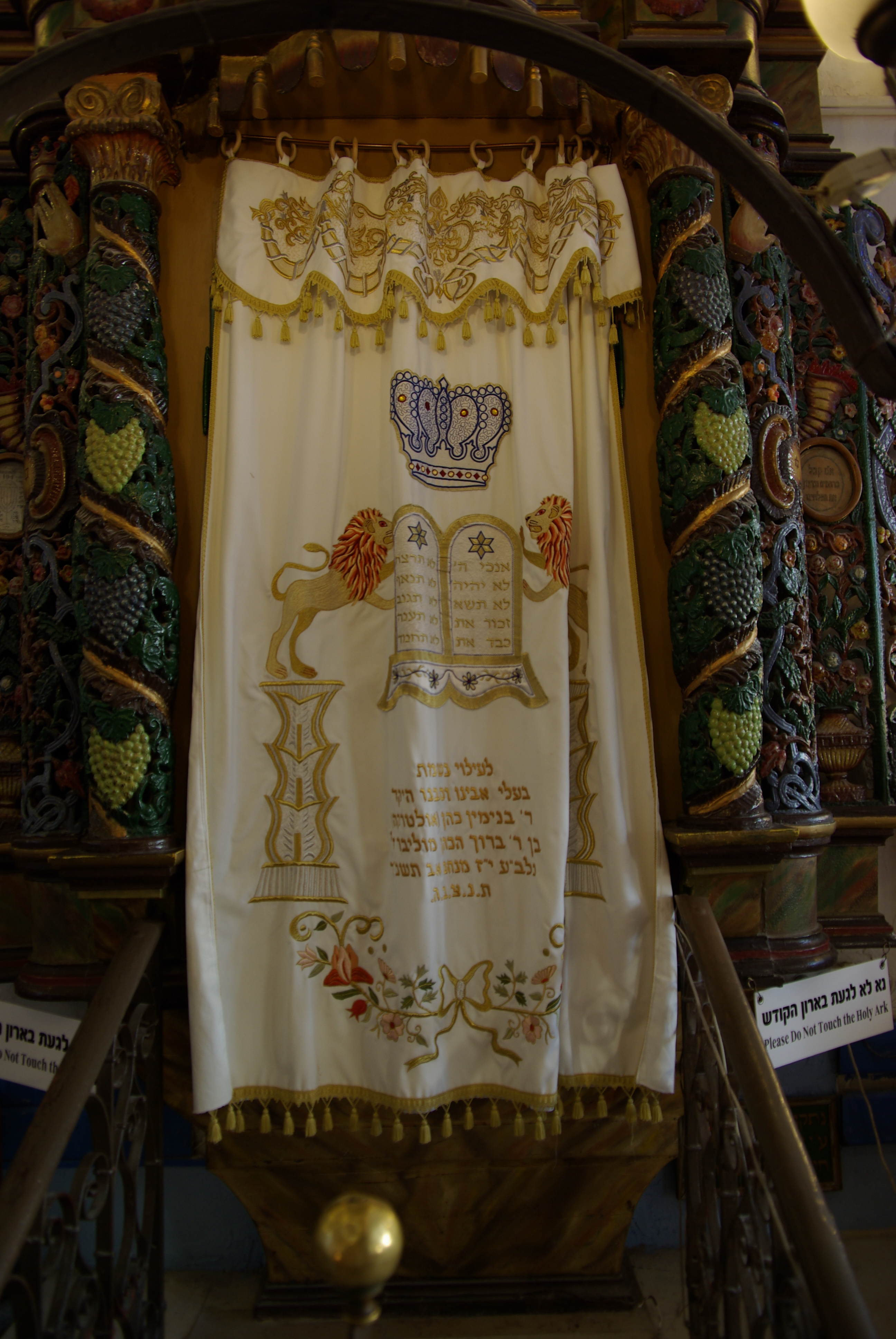 Synagoge in Safed